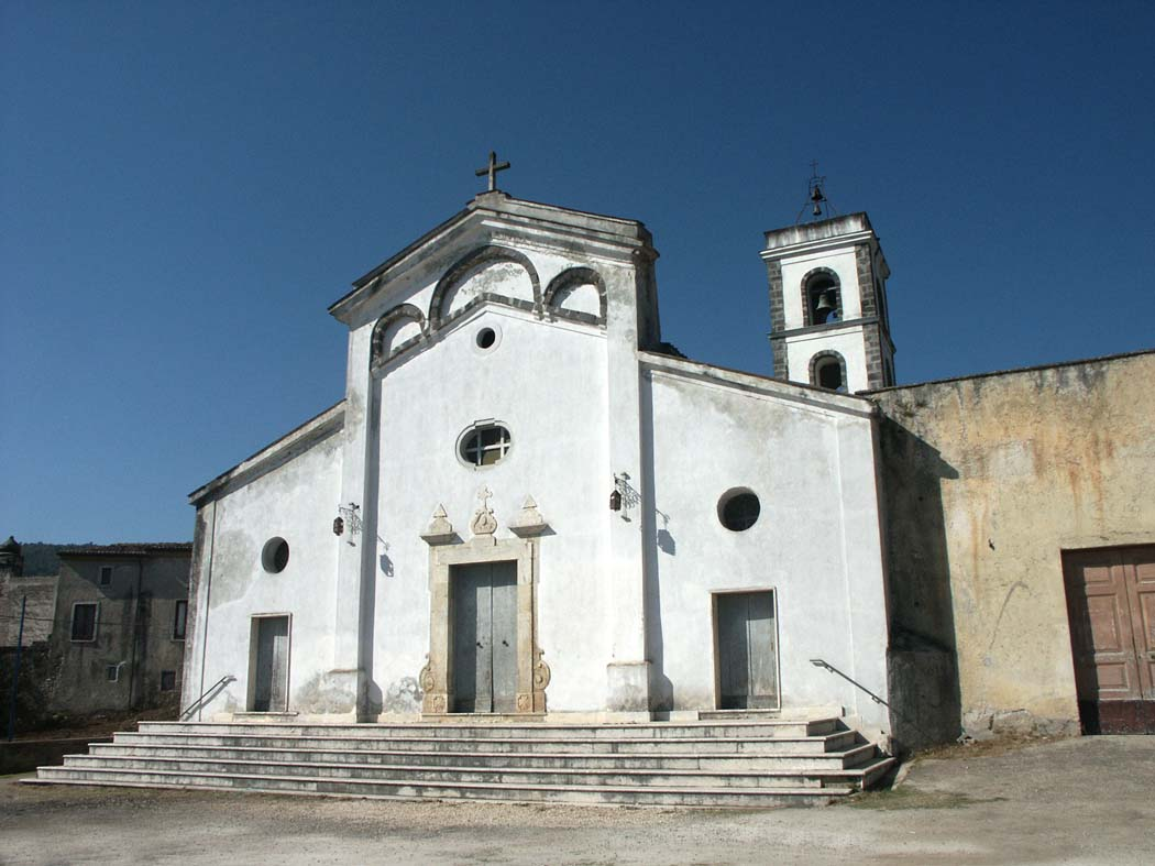 Autore Alvimas